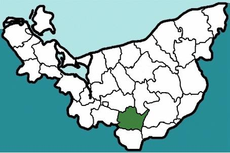 Lage des Landkreises Arnswalde in Pommern